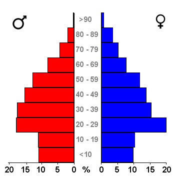 Age pyramids for the 443 municipalities in the Netherlands. Data 2007. Statistics provided by Centraal Bureau voor de Statistiek, Voorburg/Heerlen. Source: Tabel: Bevolking Nederland per gemeente en diverse regio's naar leeftijd, geslacht en burgerlijke staat, 1 januari 1988-2007. Gewijzigd op 24 mei 2007 (on-line database StatLine) Bevolkingspiramide - Gemeente Leiden (2007).png